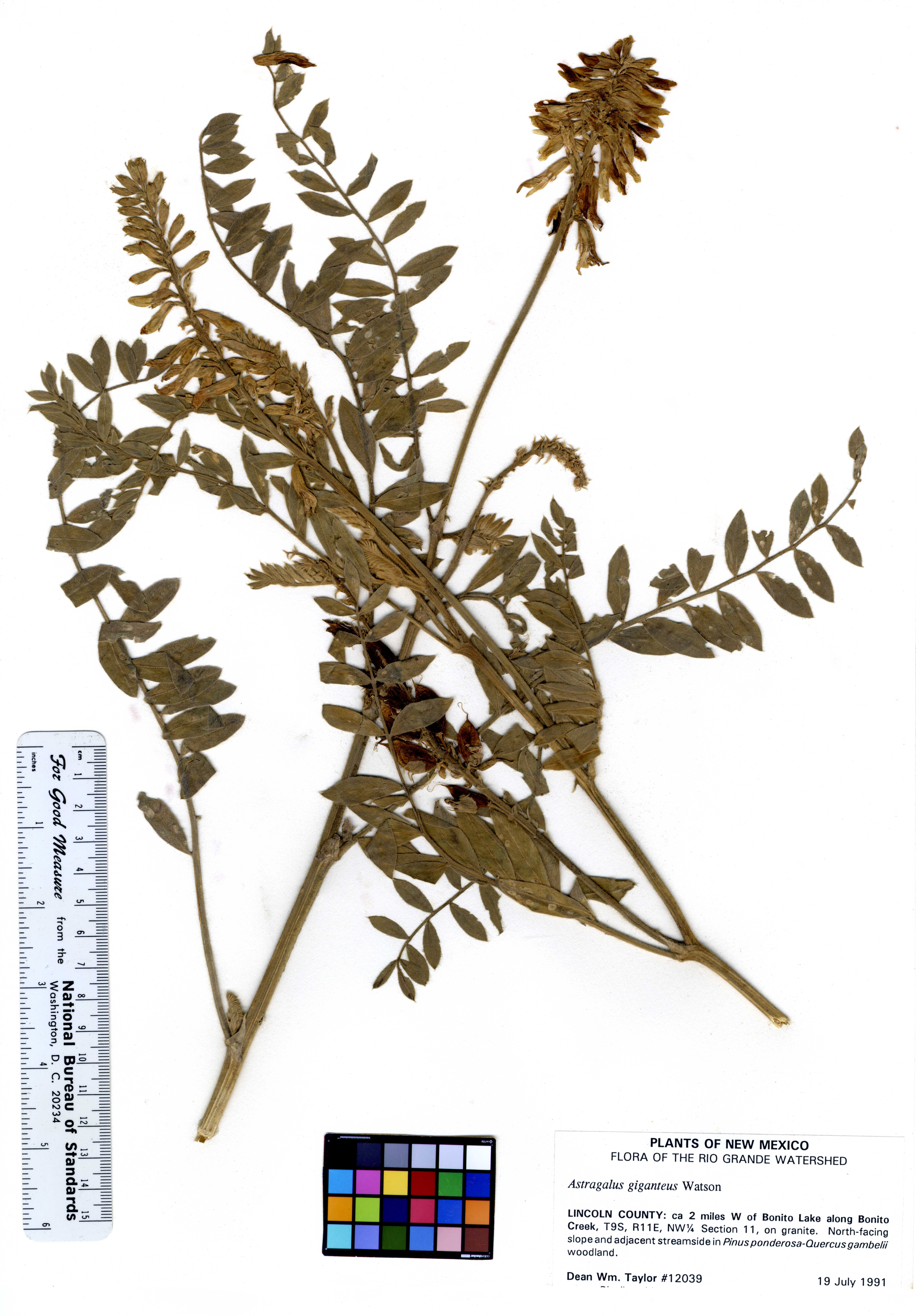 Astragalus giganteus